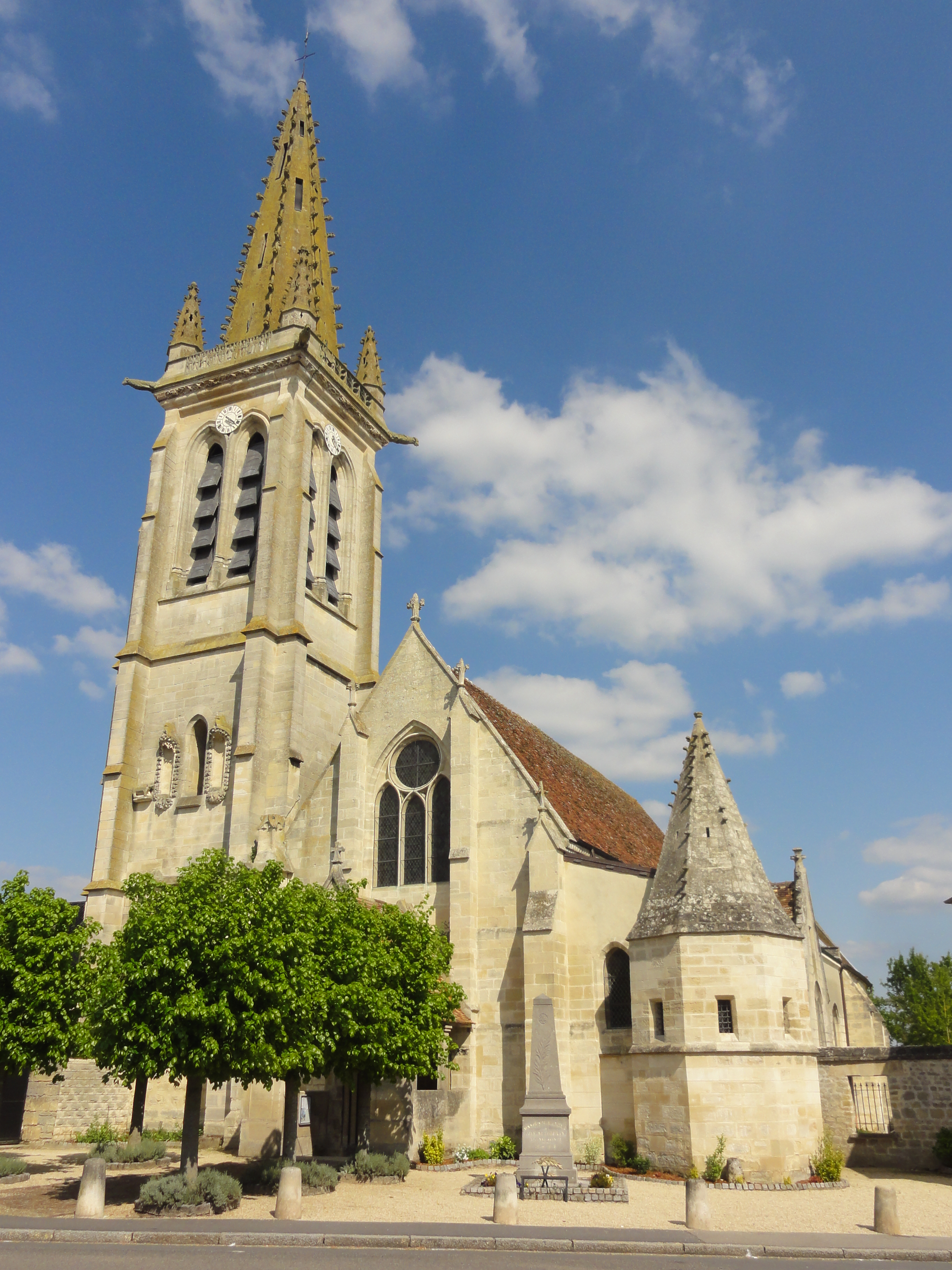 Façade occidentale.